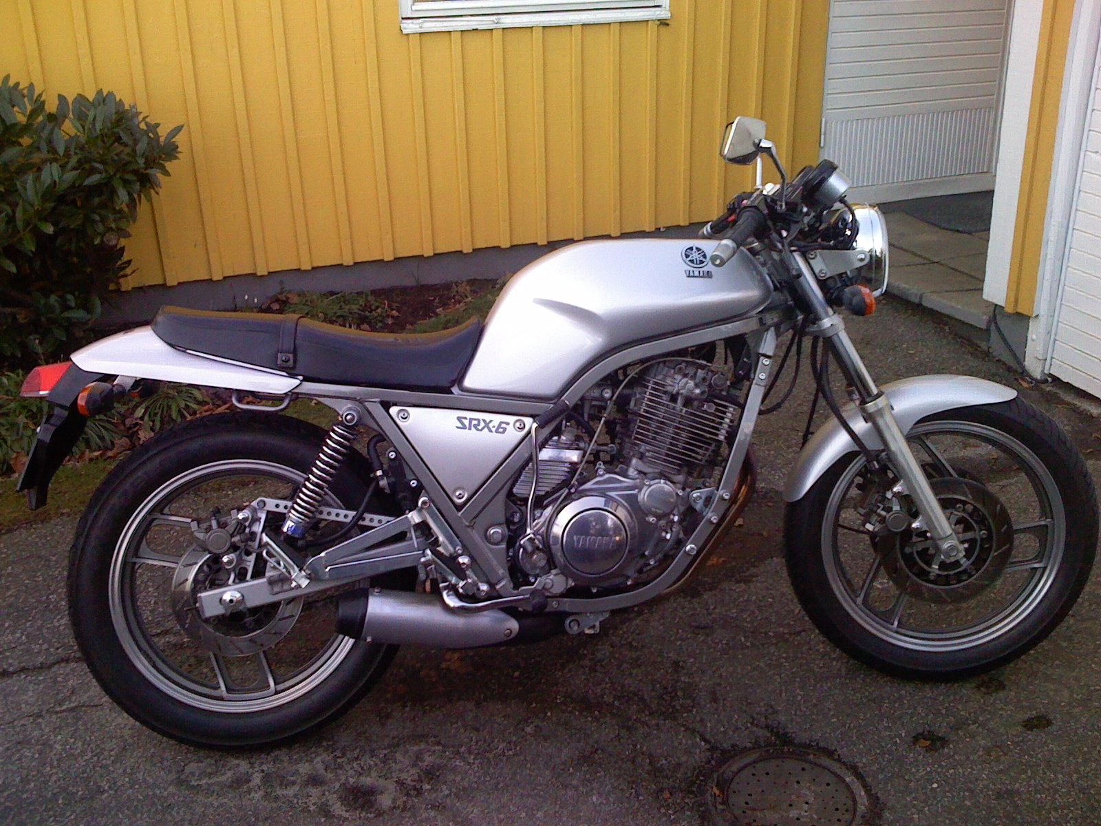 600cc encylindig skönhet